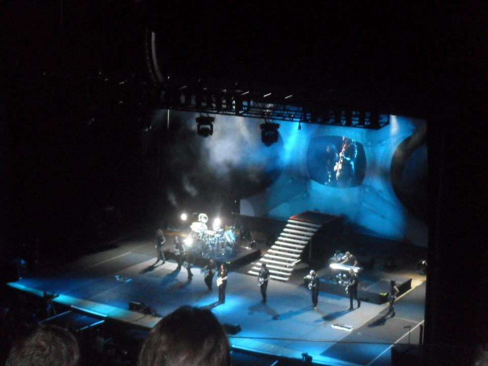 A cantora italiana Laura Pausini cantando Inedito durante um show pela tournée do album de mesmo nome.